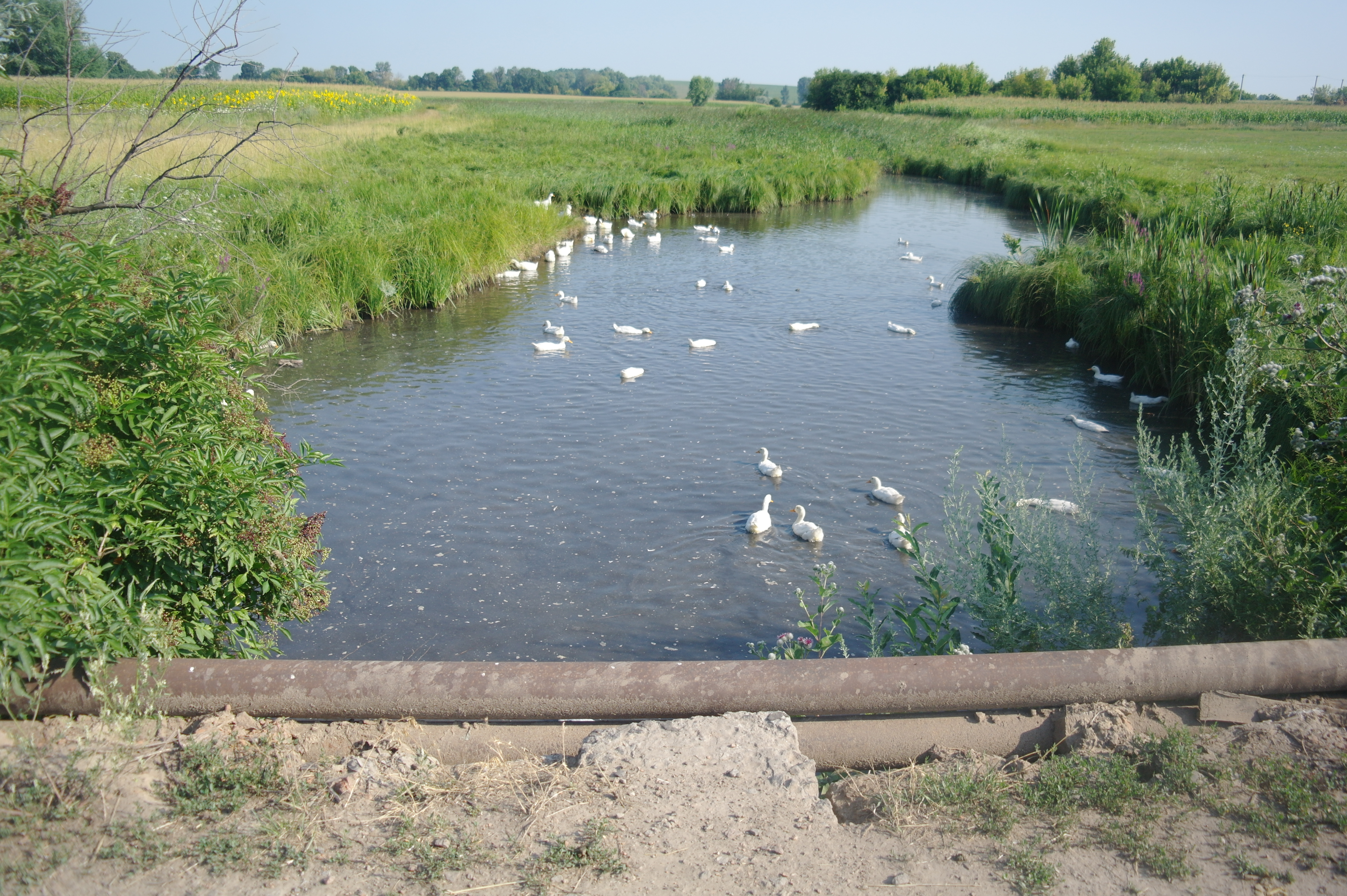 річка